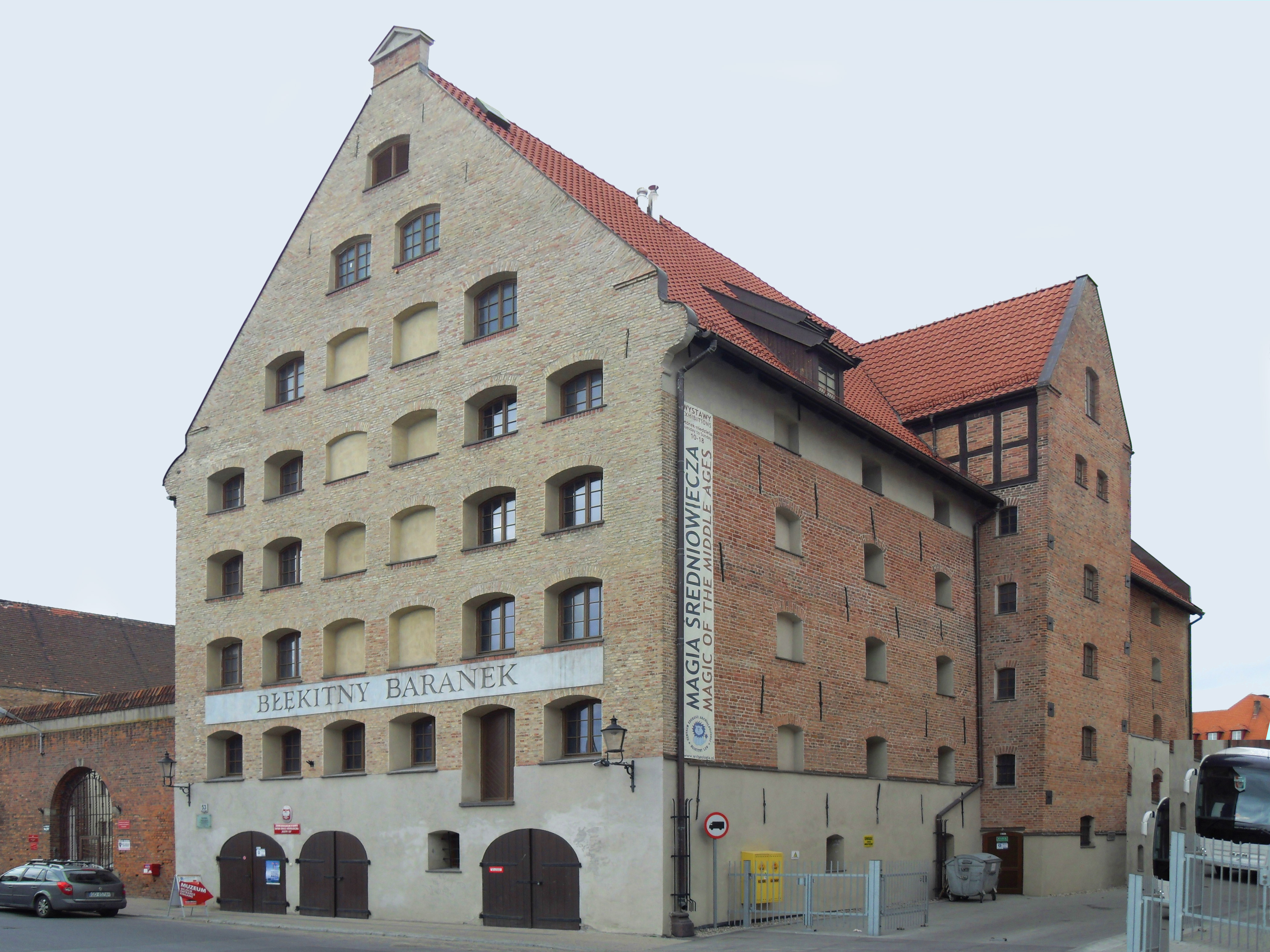 Gdańsk, Wyspa Spichrzów. Ul. Chmielna, spichlerz Błękitny Baranek.